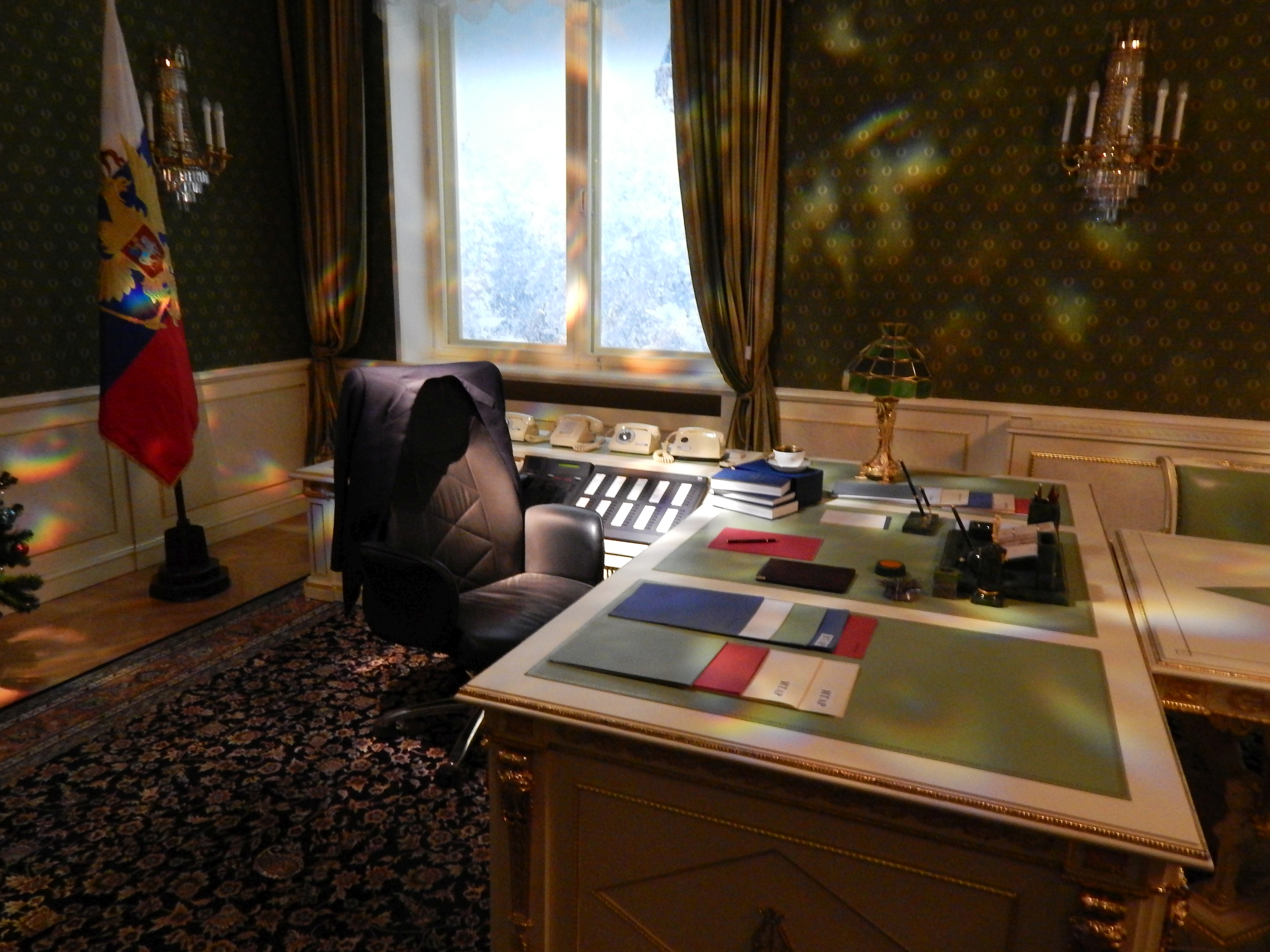 Музей Ельцина в Екатеринбурге